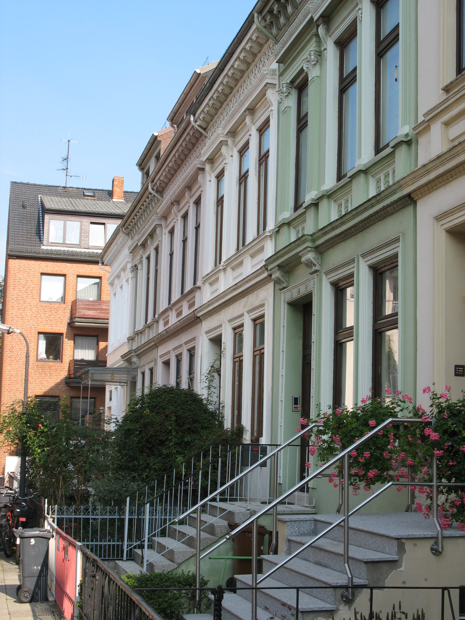 Bremen, Viertel, typische Reihe Bremer Häuser (hier: Goethestraße)